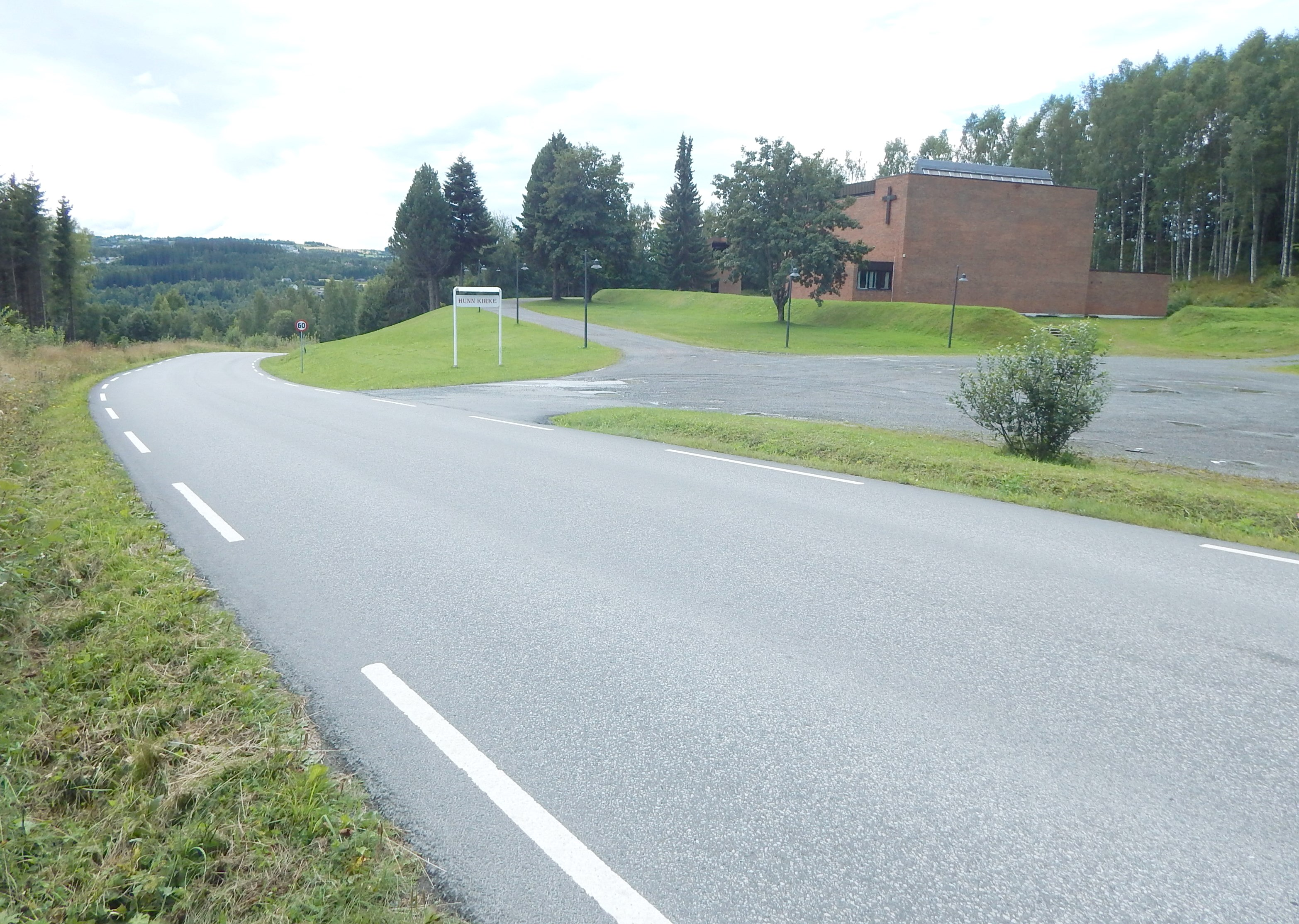 Åsvegen forbi Hunn kirke